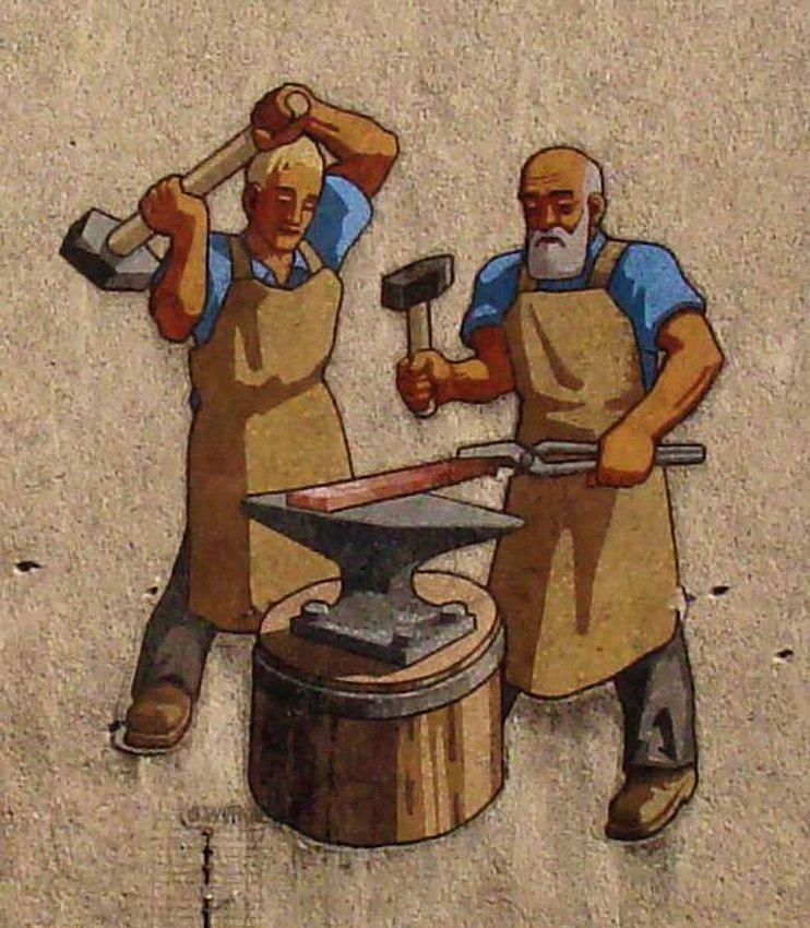 Poniemiecka mozaika zdobiąca fasadę budynku przy Ustroniu 11, autor Gabriel Wystub